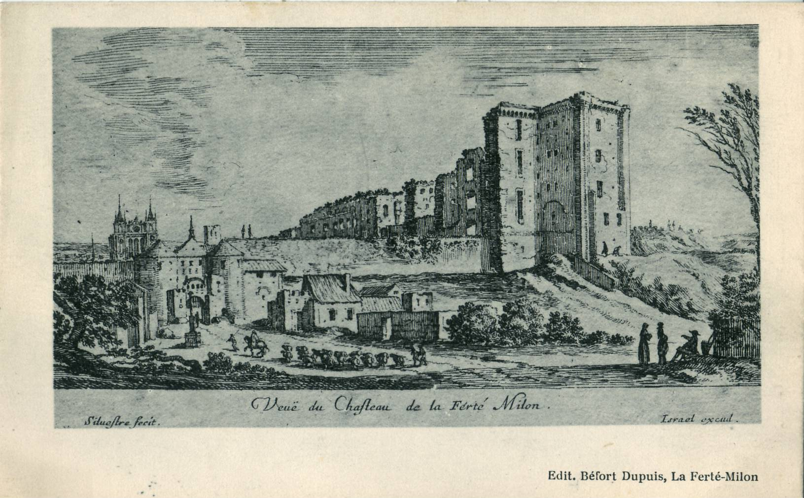 Carte postale ancienne éditée par Béfort-Dupuy, représentant une gravure ancienne non datée du Château de la Ferté-Milon